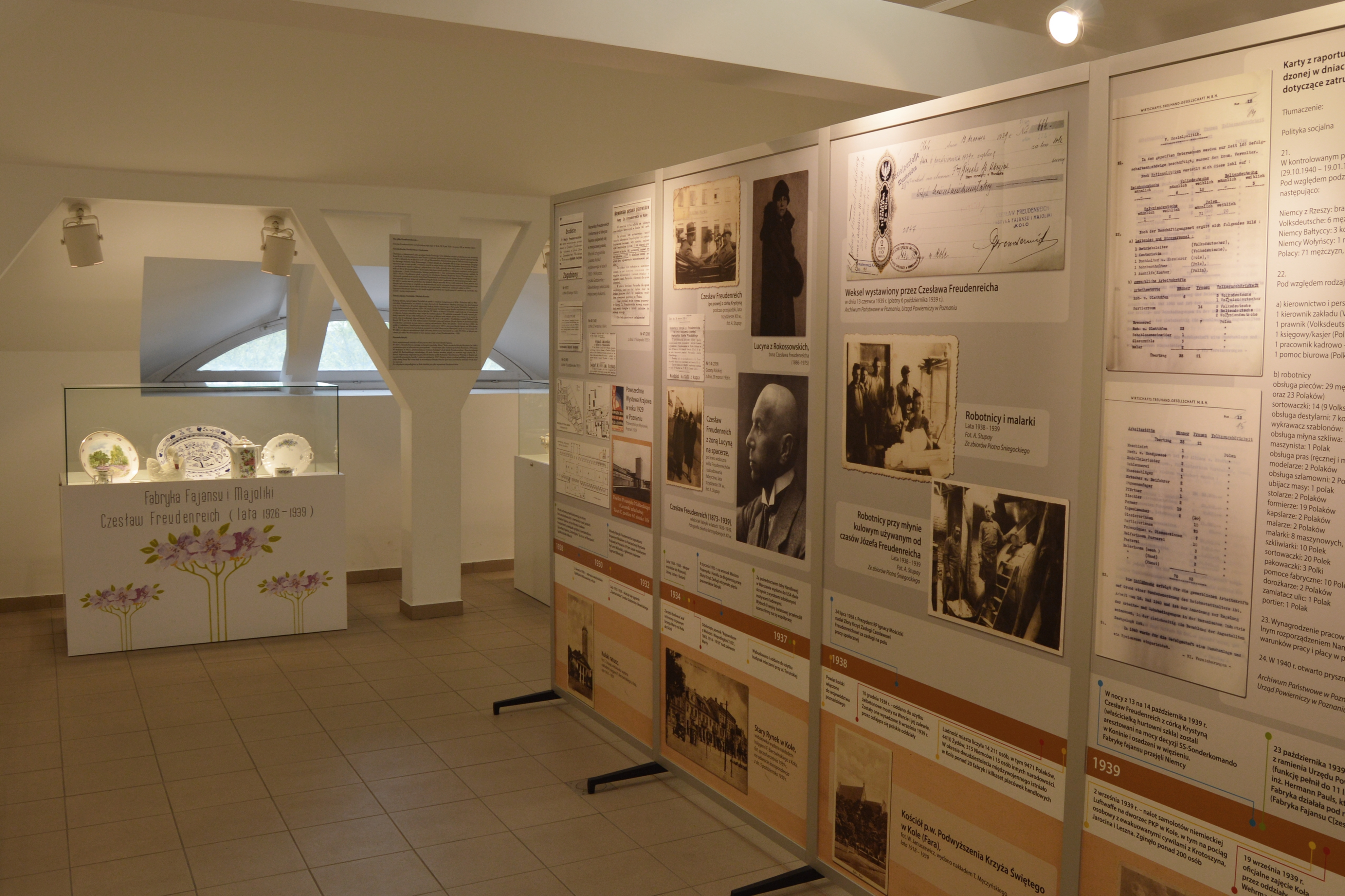 Stała wystawa historii kolskiego fajansu w ratuszu miejskim w Kole